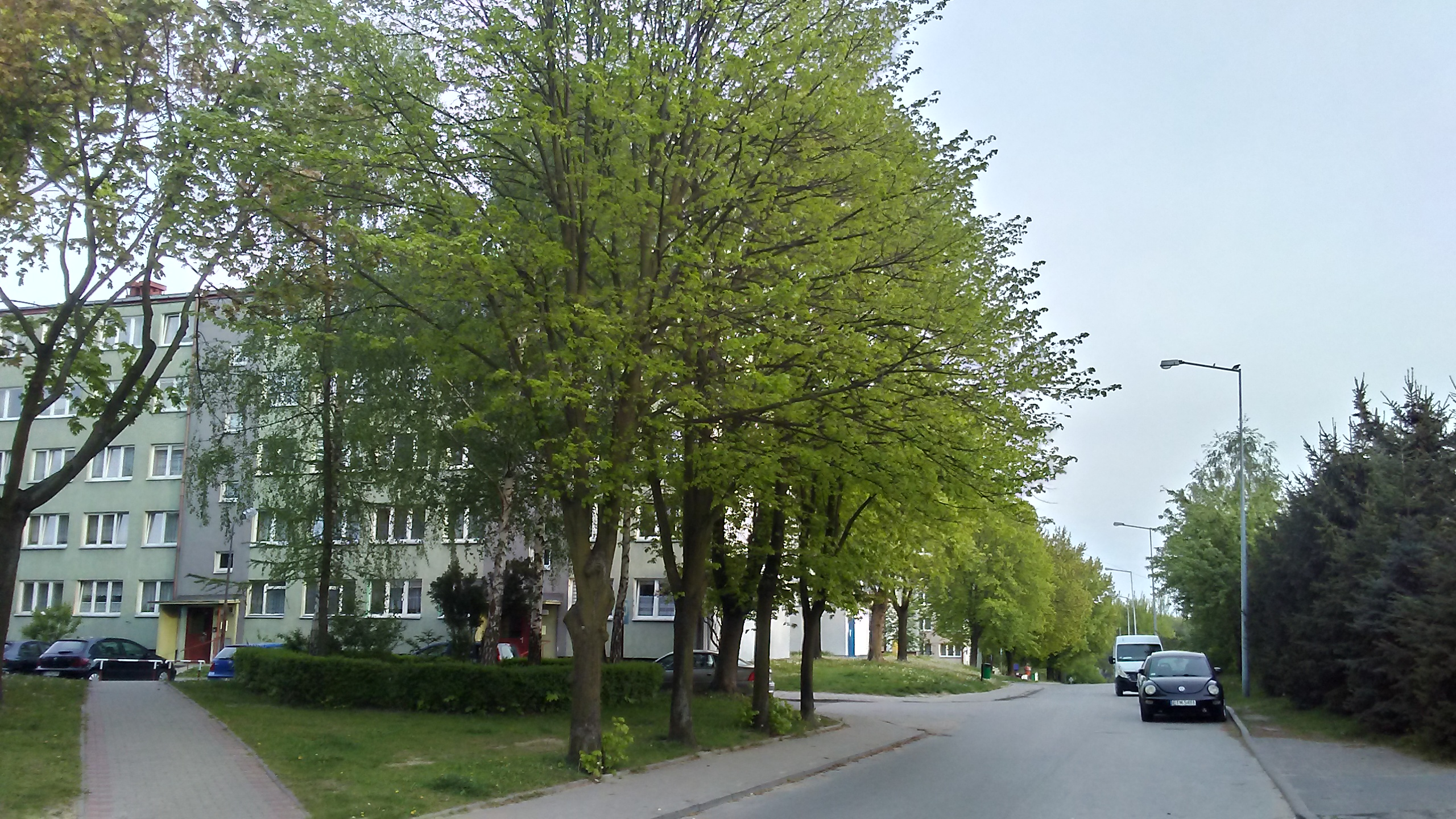 Ulica Paszkowskiego na tomaszowskim Niebrowie, Tomaszów Mazowiecki w województwie łódzkim, PL, EU. CC0